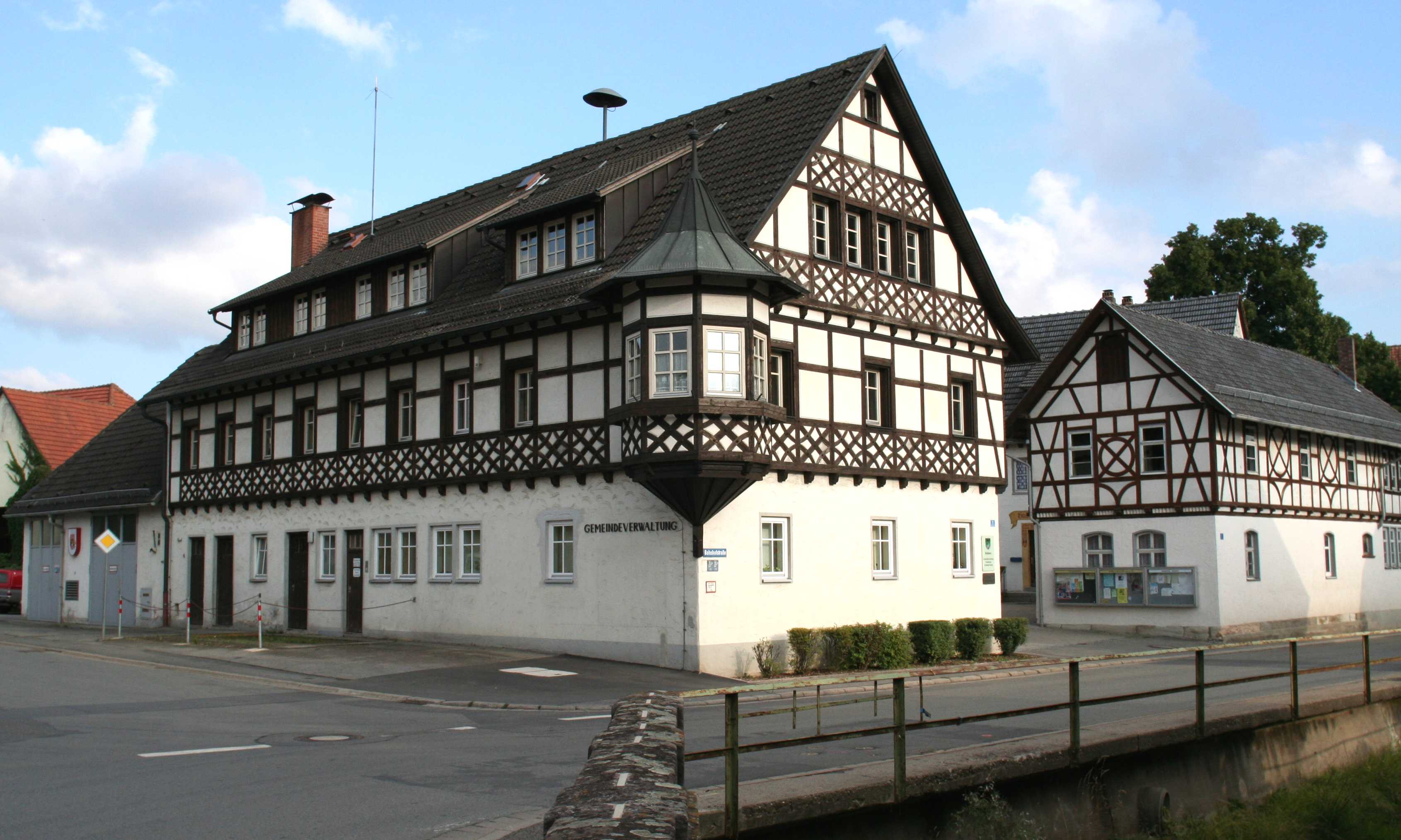 Rathaus Meeder Rathaus und Gemeindeverwaltung Meeder, Landkreis Coburg